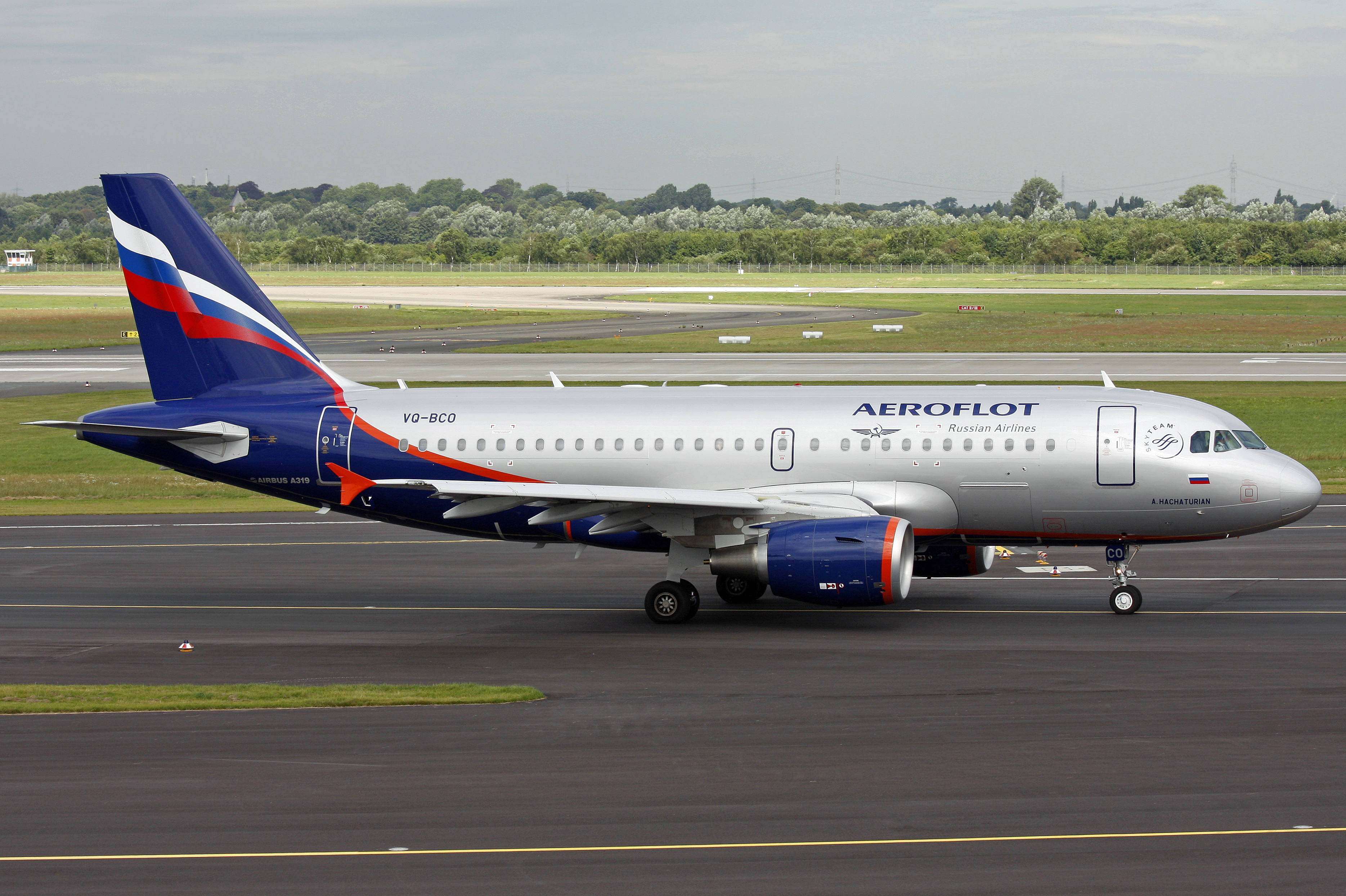 DUS 21-07-09